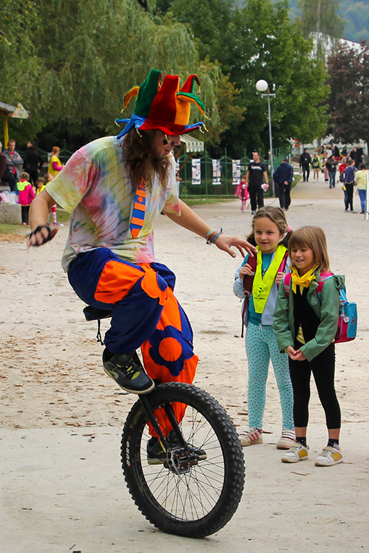 Klovn (Jernej Gruber na monokolesu)